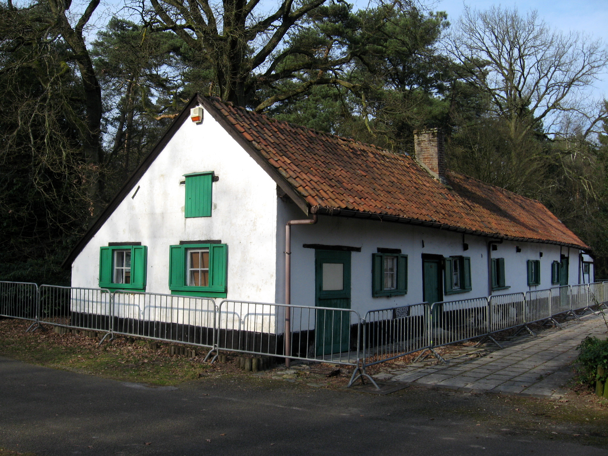 Hoeve Mieneke op Domein Kelchterhoed in Houthalen